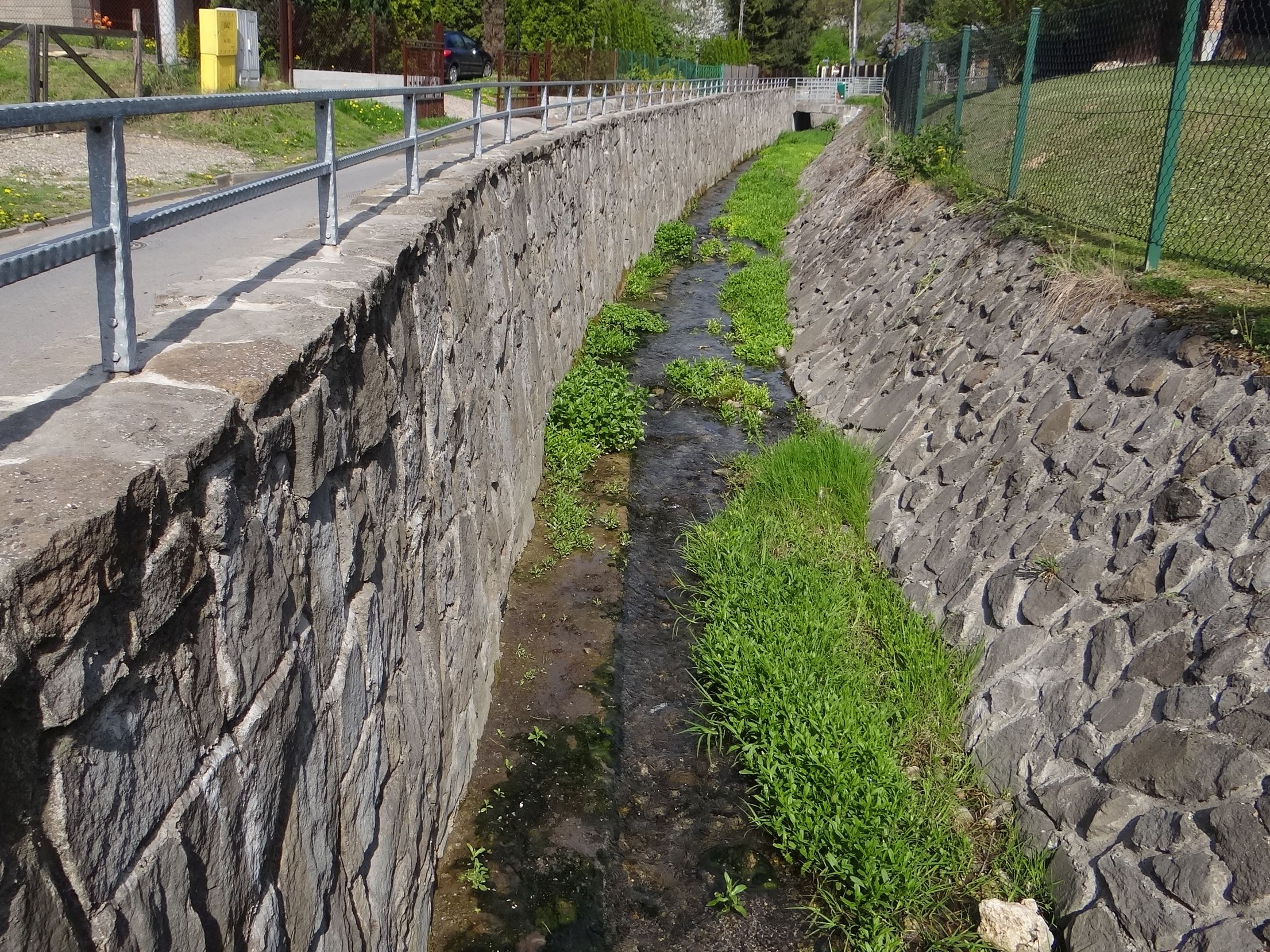 Potok Kobylanka w Kobylanach